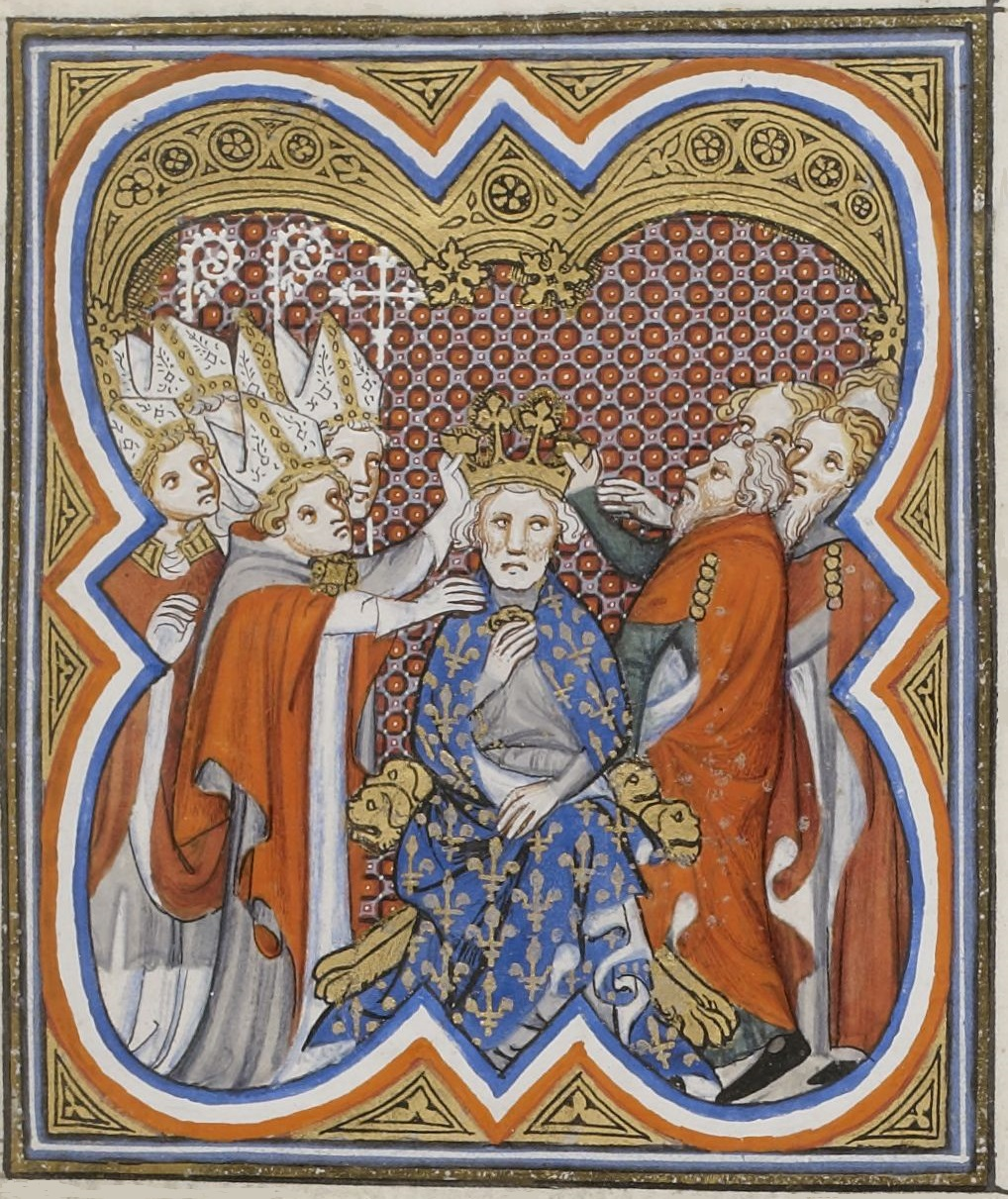 Sacre du roi Jean le Bon. Enluminure des Grandes Chroniques de France, vers 1375-1380. Paris, Bibliothèque nationale de France, département des Manuscrits, Français 2813, folio 393 recto.